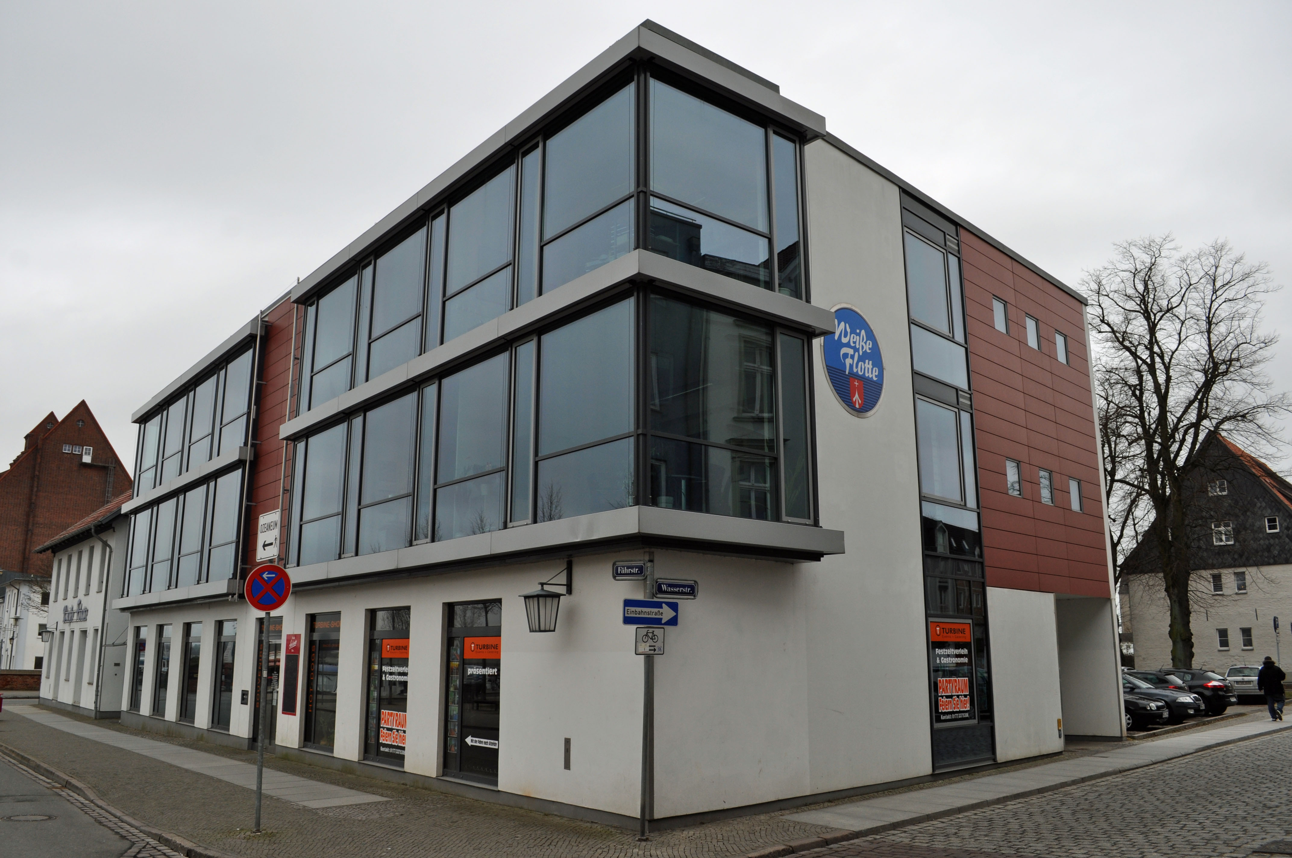 Gebäude bzw. Gebäudedetail in Stralsund. Straße und Hausnummer siehe Dateiname.